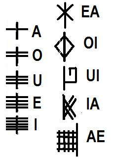 Ogham alphabet (non-IPA)